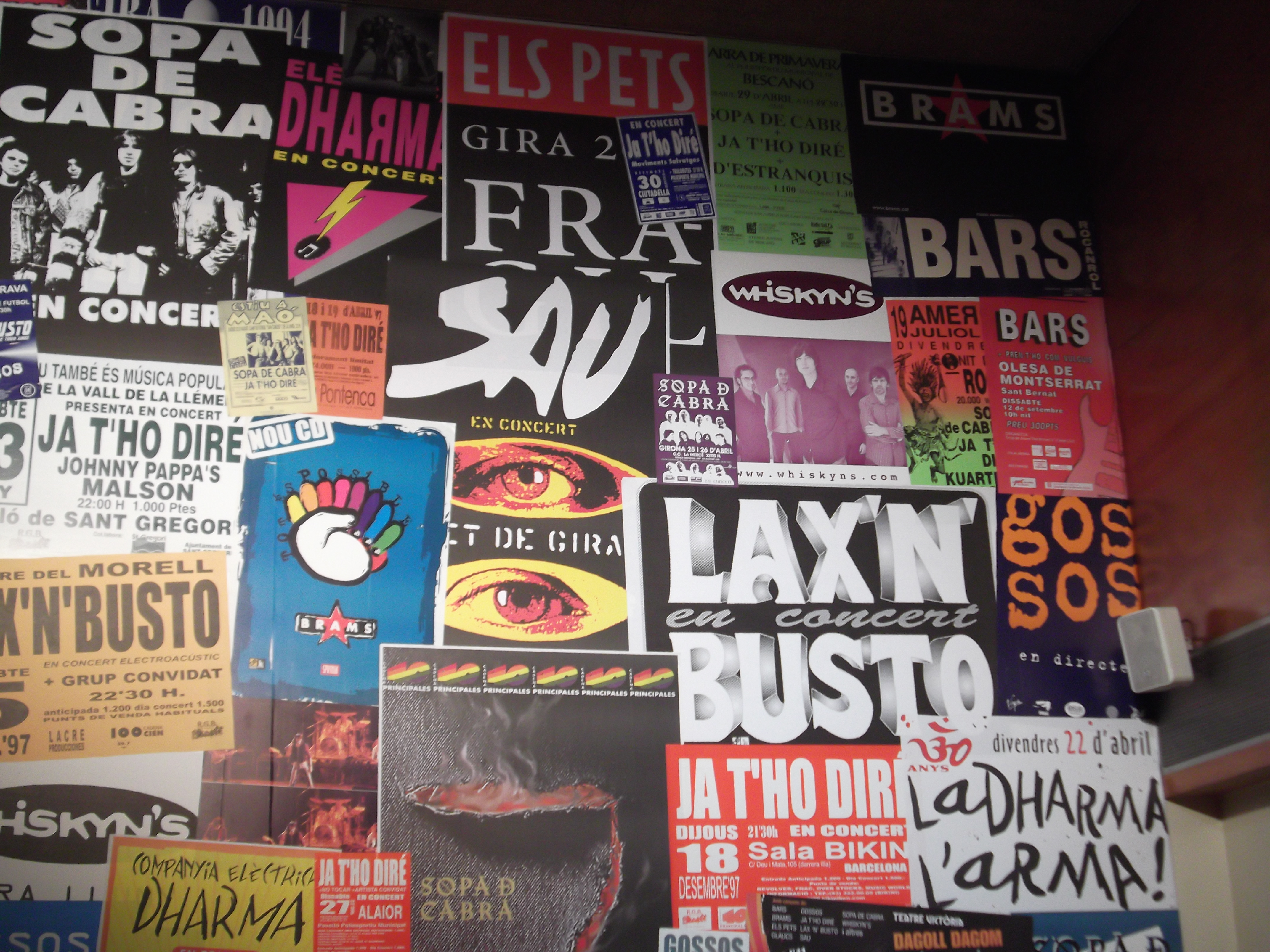 Teatre Victòria durant l'actuació del musical "Cop de Rock"